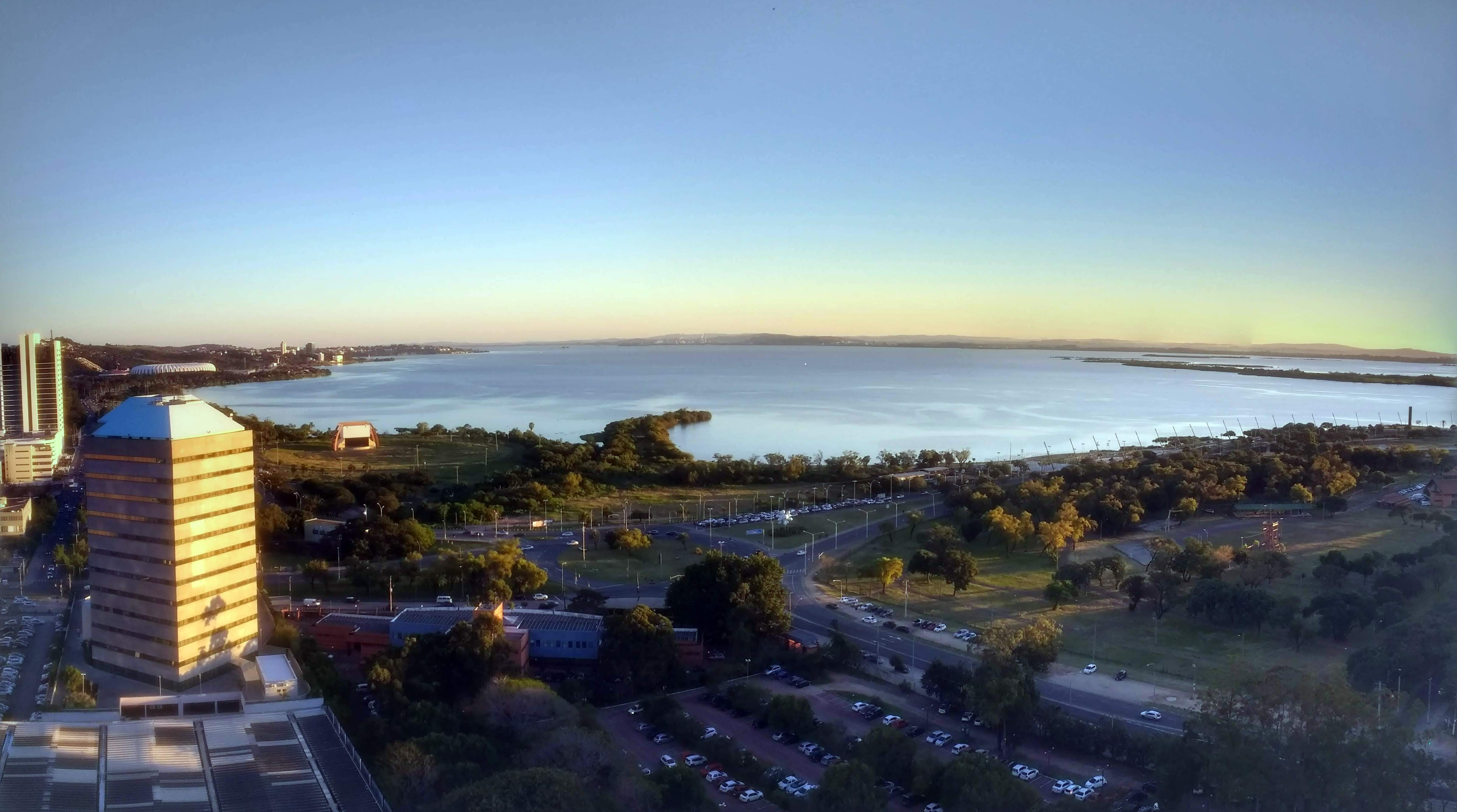 Lago Guaíba